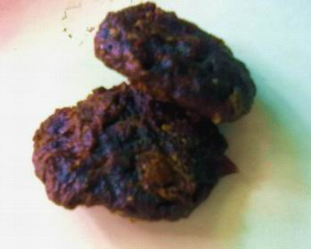 家乡特产——饼状豆豉果